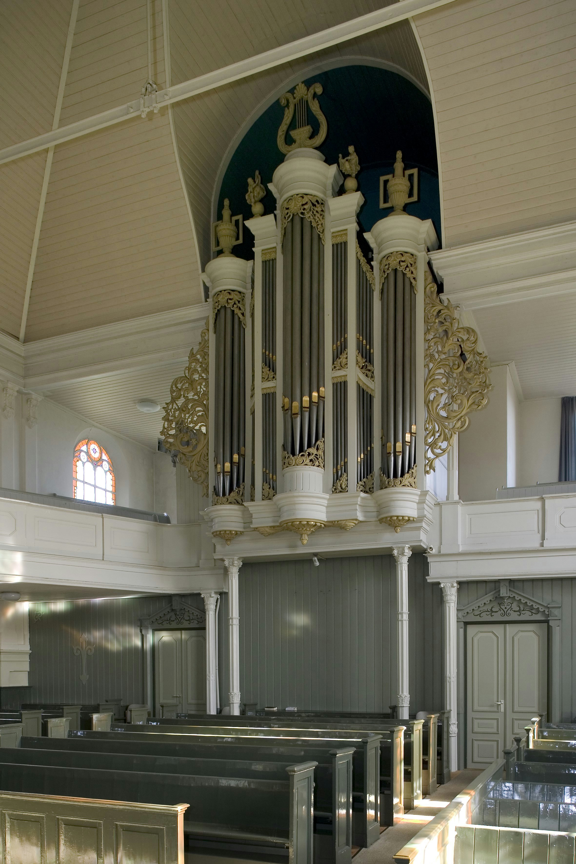 Gereformeerde kerk: Interieur, zicht op het orgel